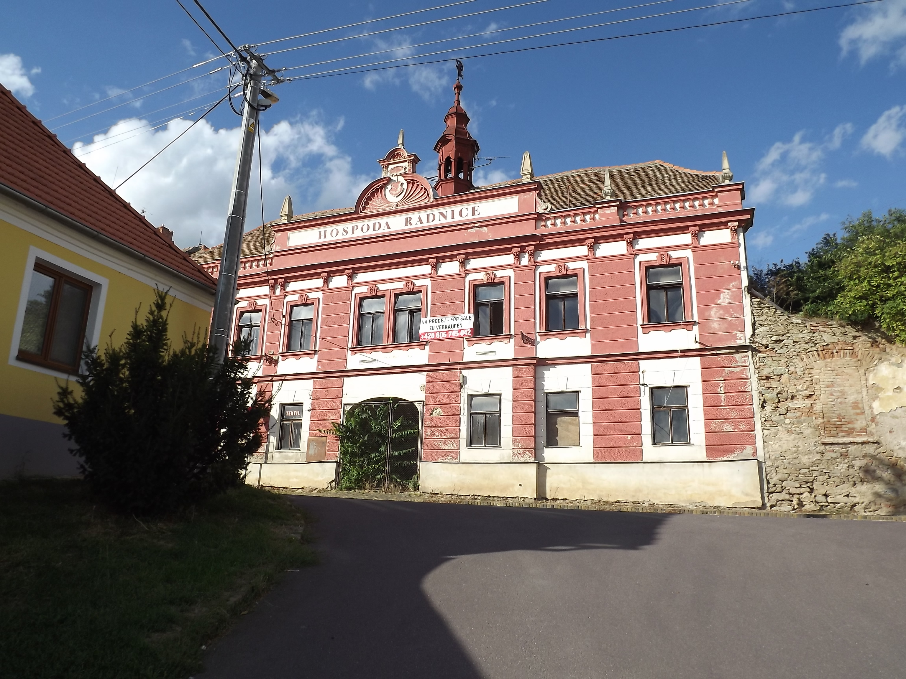 Radnice, Šatov 20